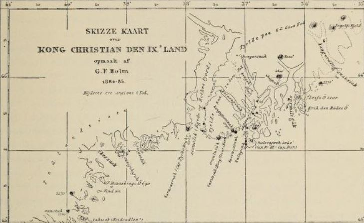 Carte représentant le sud-est du Groenland - région King Christian IX Land par l'explorateur Gustav Holm, en 1885.